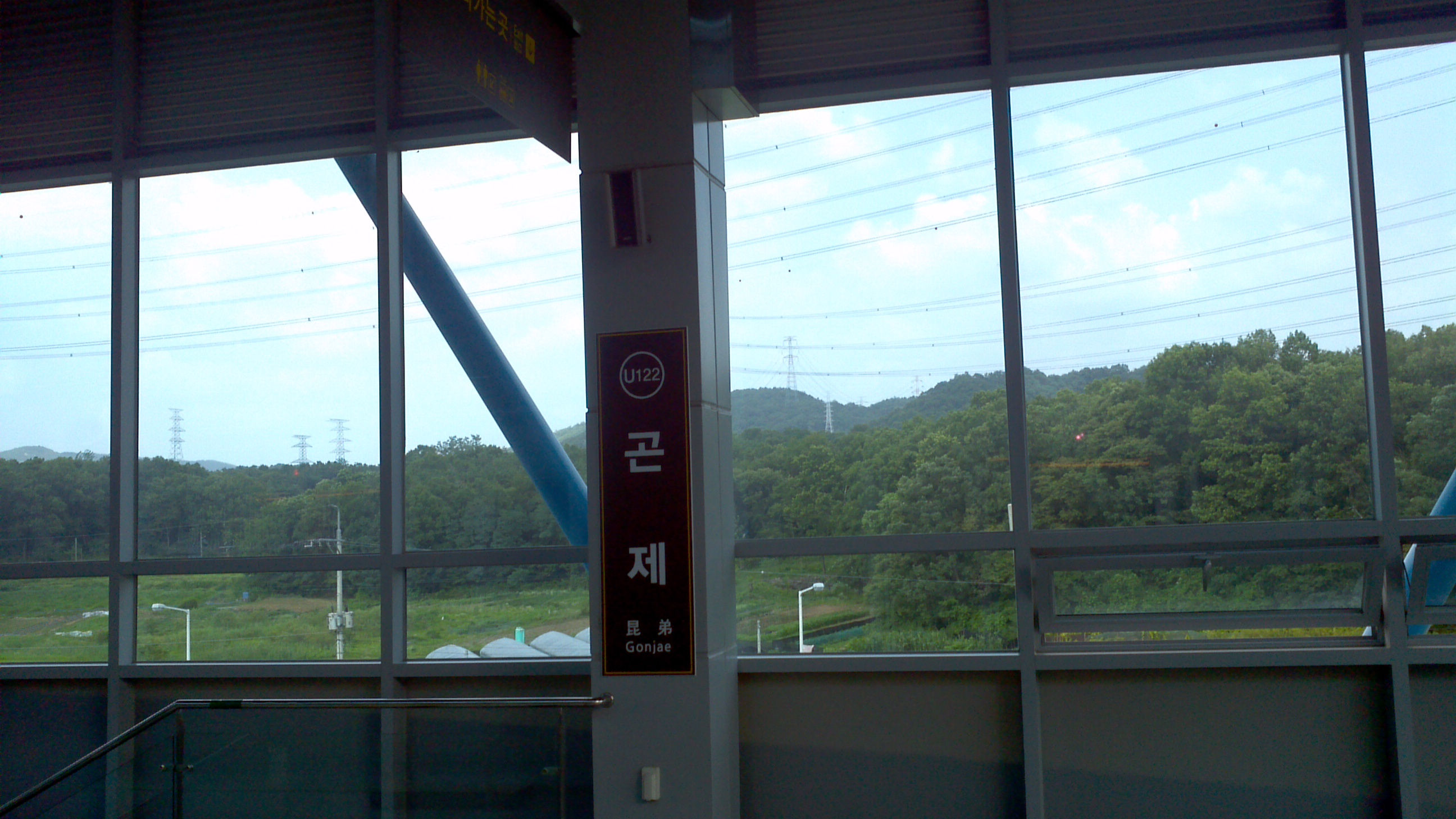 범골역 역명판